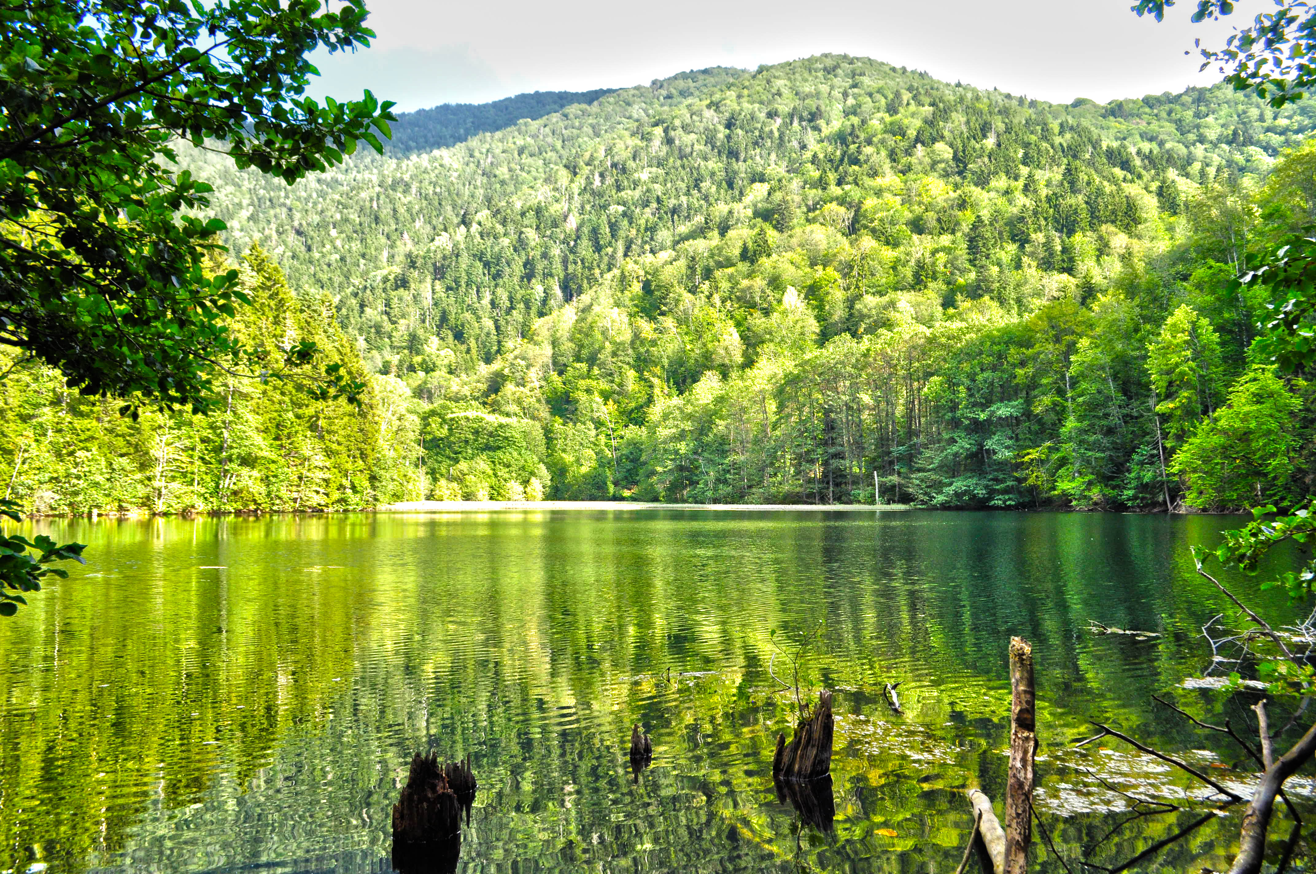 ბატეთის ტბა